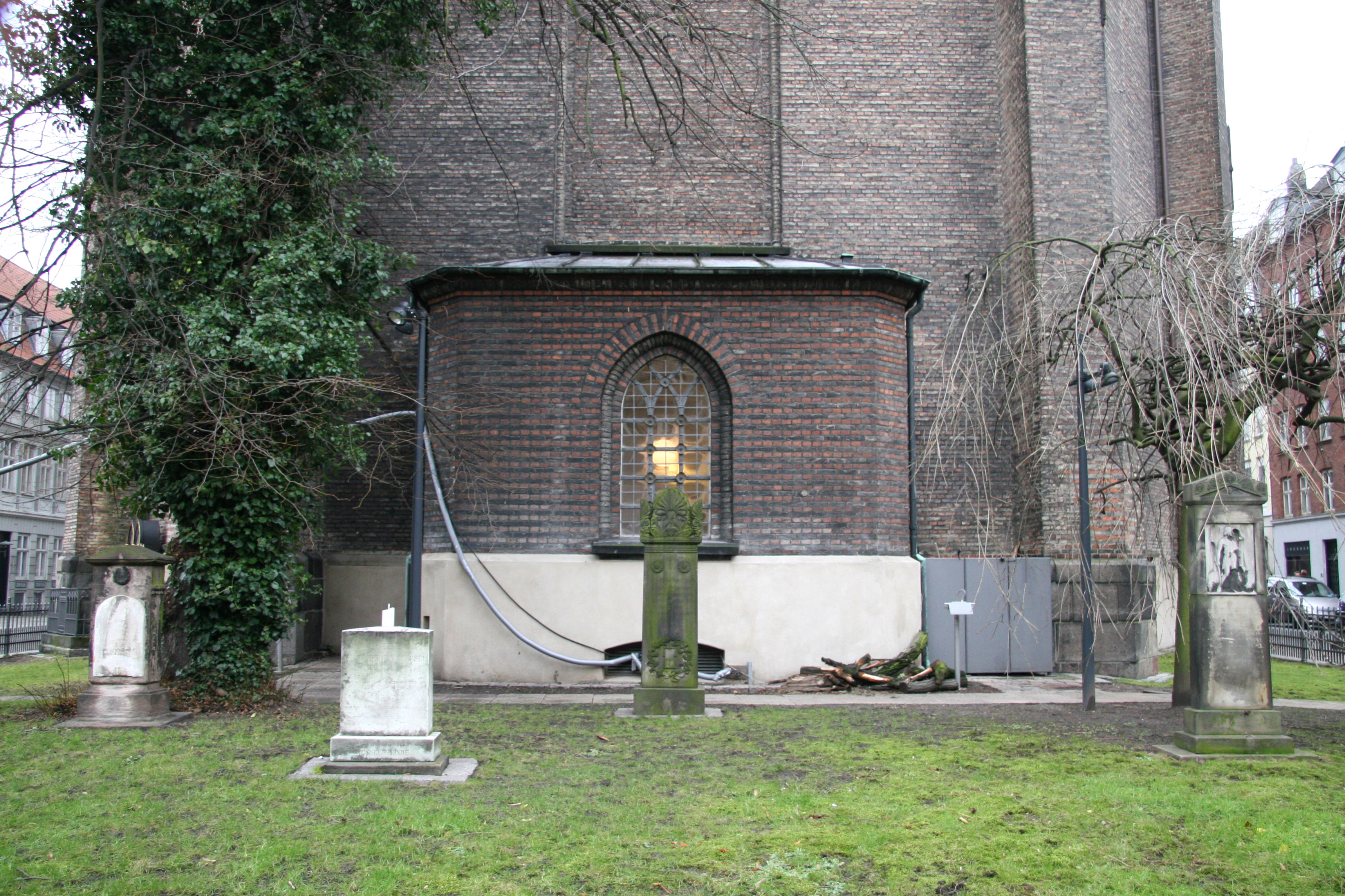 Trinitatis Kirke, Copenhagen, Denmark. Tilbygning.